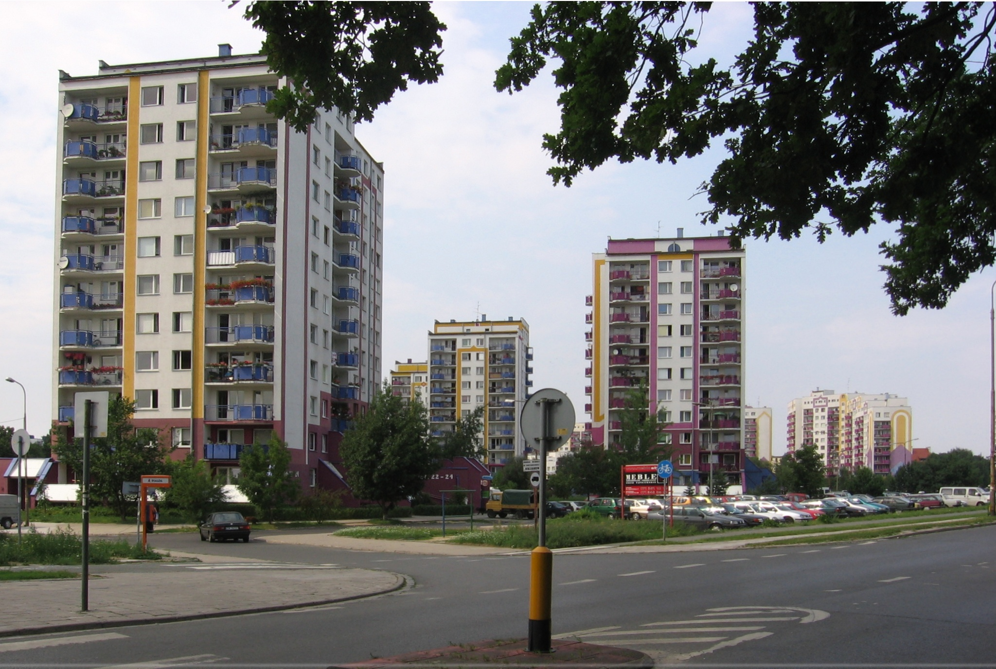 Kozanów settlement in Wrocław, Poland